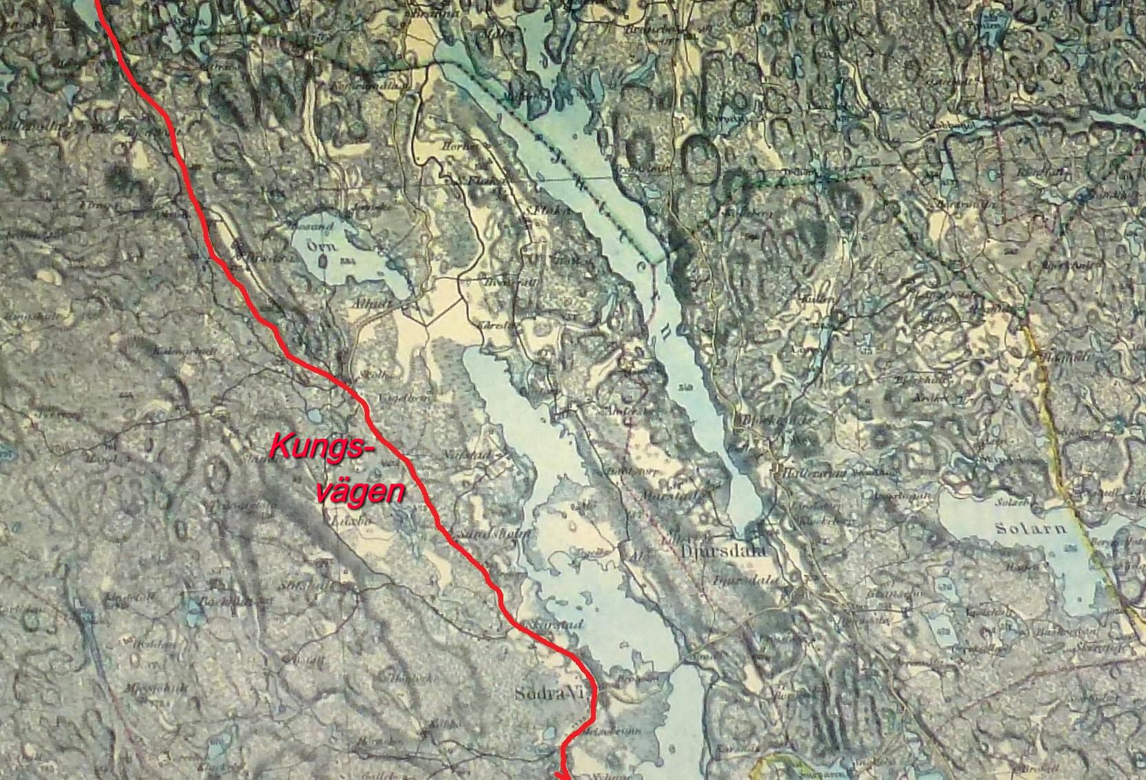 Kungsvägen vid Södra Vi på Generalstabskartan från 1885